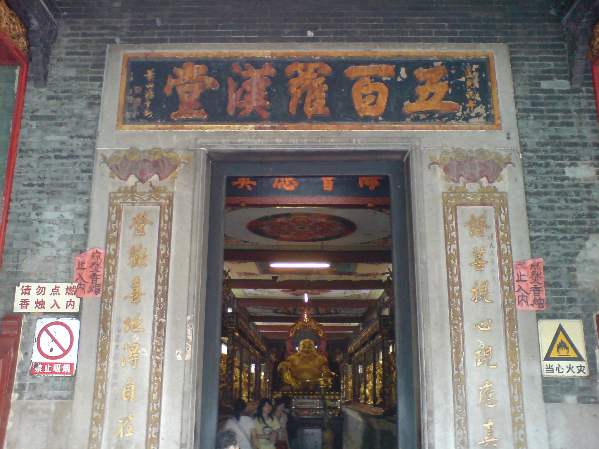 广州华林寺五百罗汉堂正门